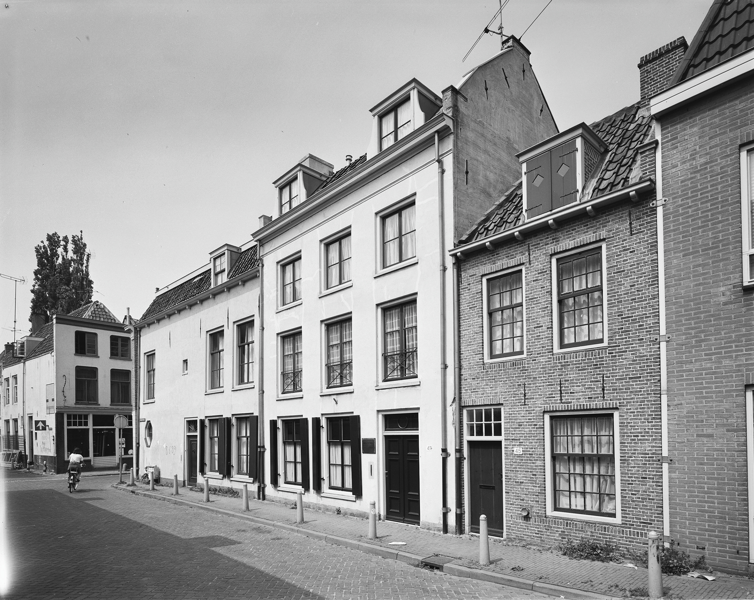 Exterieur OVERZICHT VOORGEVELS